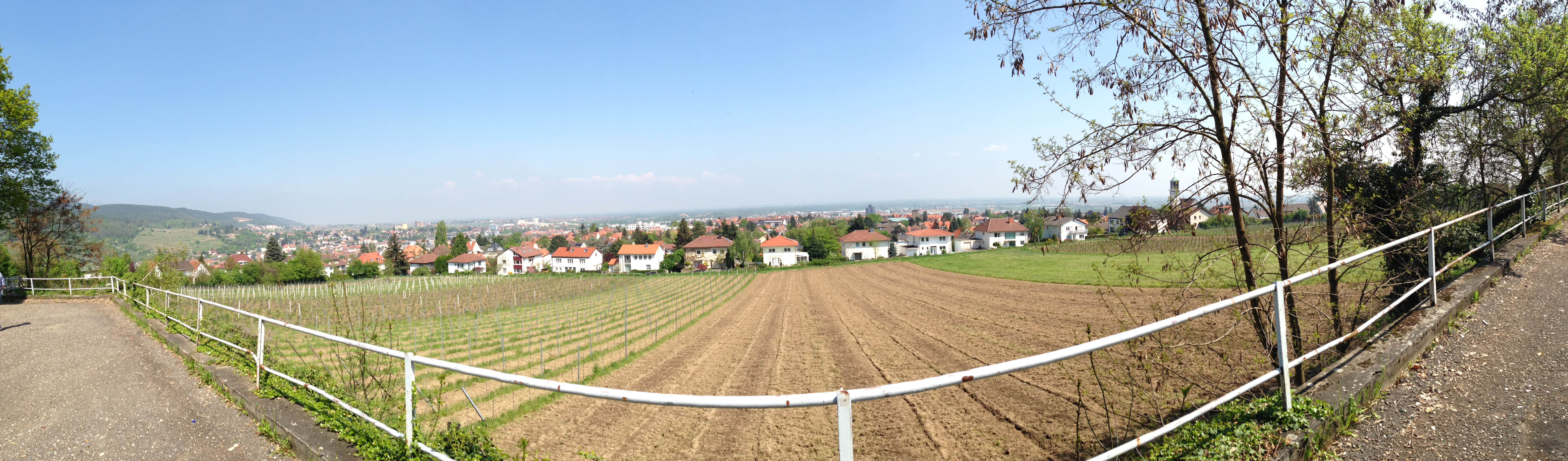 Hambacher Höhe